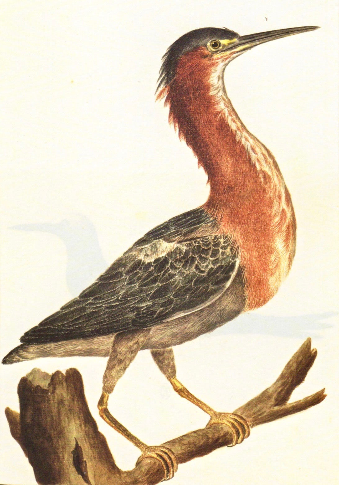 Antonio González (französisch Antoine Gonzalès, aus Madrid, Lebensdaten unbekannt): Rötelreiher (Egretta rufescens), Saint Thomas (Dänisch-Westindien, heute Virgin Islands). Aquarell aus dem Tagebuch von Kapitän Nicolas Baudin (1754–1803) von dessen Antillenexpedition (1796–1798) im Auftrag des Direktoriums der Französischen Republik. Muséum national d’histoire naturelle, Paris.